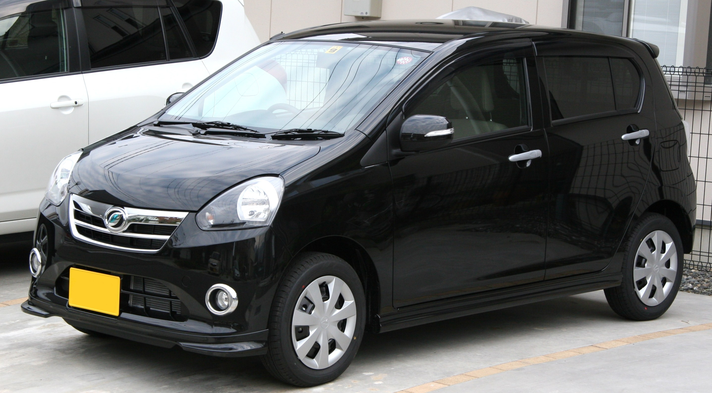 Daihatsu Mira e:S